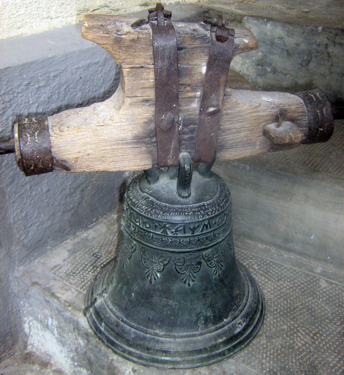 Biserica de lemn din Borza, Sălaj. Clopotul mic al vechii biserici cu inscripţie datată din 1740.